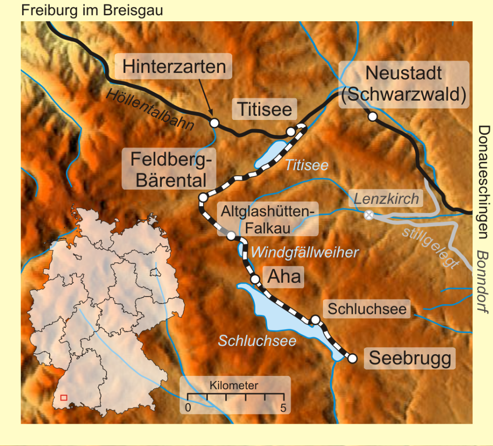 Verlaufskarte Dreiseenbahn